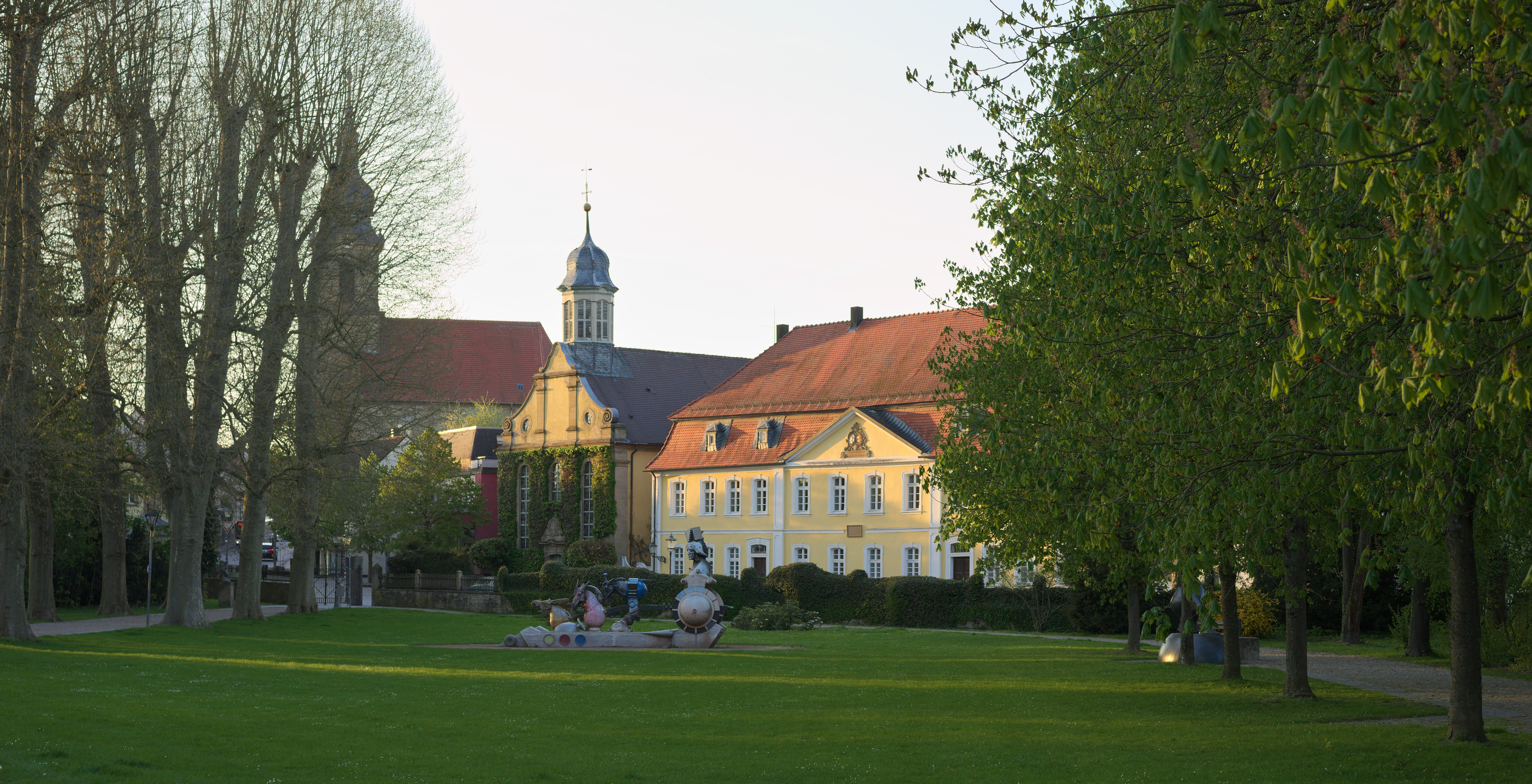 Angelbachtal, Ortsteil Eichtersheim: Das nördliche Ende des Schlossparks. Im Hintergrund das Rentamt (Mitte) und die ehemalige Schlosskirche (links davon) im Ortsteil Eichtersheim der Gemeinde Angelbachtal (Rhein-Neckar-Kreis). Im Mittelgrund eine Skulptur von Jürgen Goertz, deren Abbildung uns (a) wegen der Panoramafreiheit und (b) weil sie auf diesem Foto eher Beiwerk ist erlaubt sein sollte.